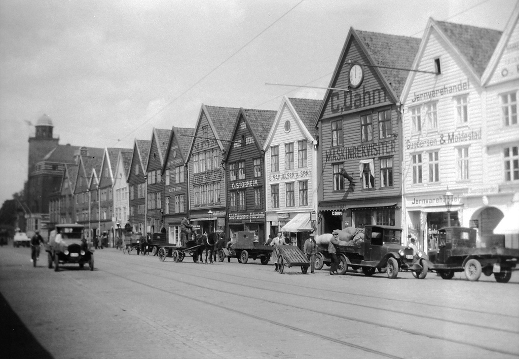 Hanseatic buildings at "German Wharf" in Bergen. Bryggen is today a UNESCO World Heritage. "Tyskebryggen" i Bergen med byggnader från hansatiden. Bryggen är idag ett världsarv på UNESCO:s världsarvslista. Location: Bergen, Hordaland fylke (county), Norway, Norge Photograph by: Berit Wallenberg Date: 12.06.1930 Format: Film Persistent URL: Read more about the photo database (in english)